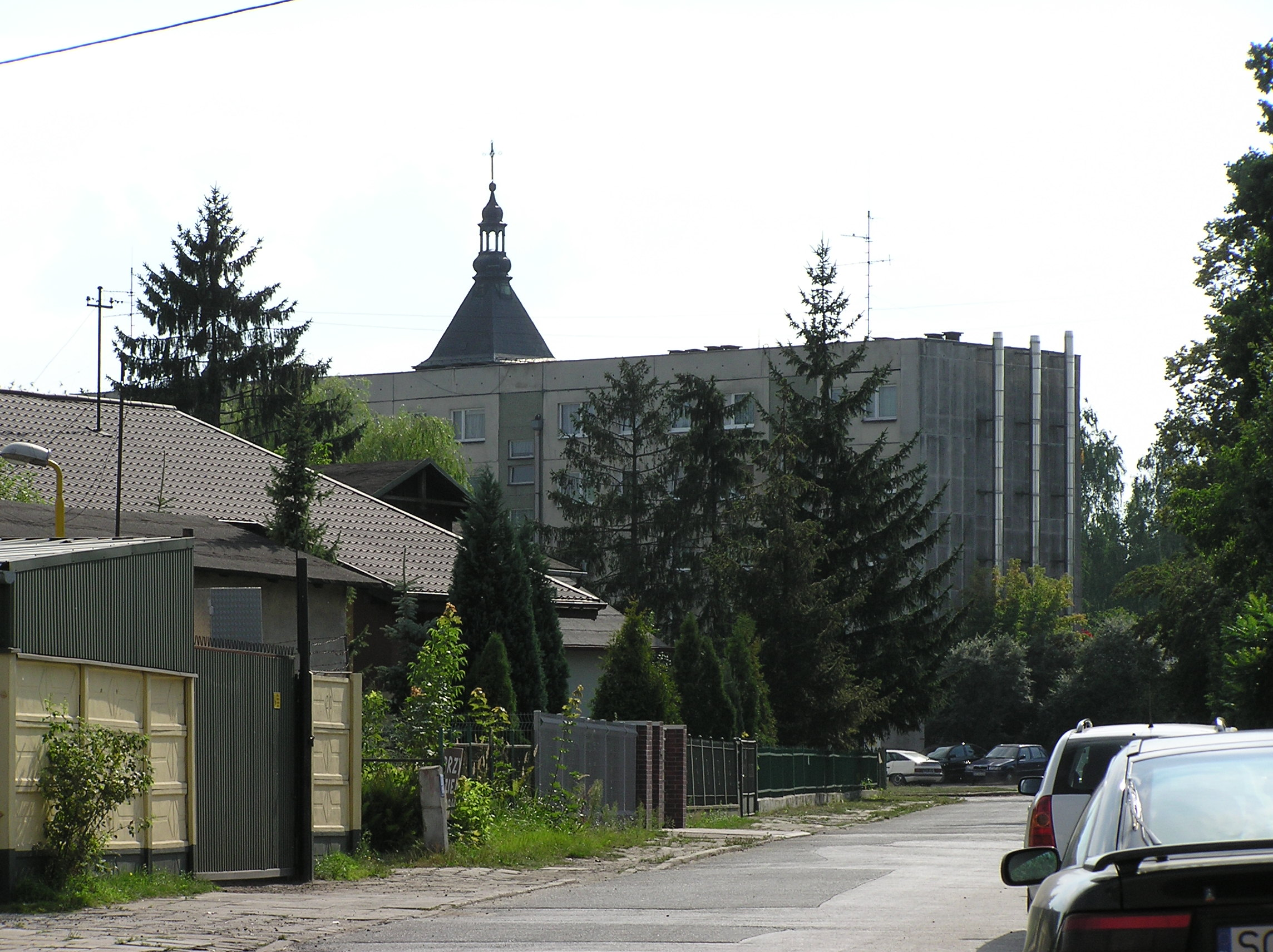 Blachownia, Parkowa Street